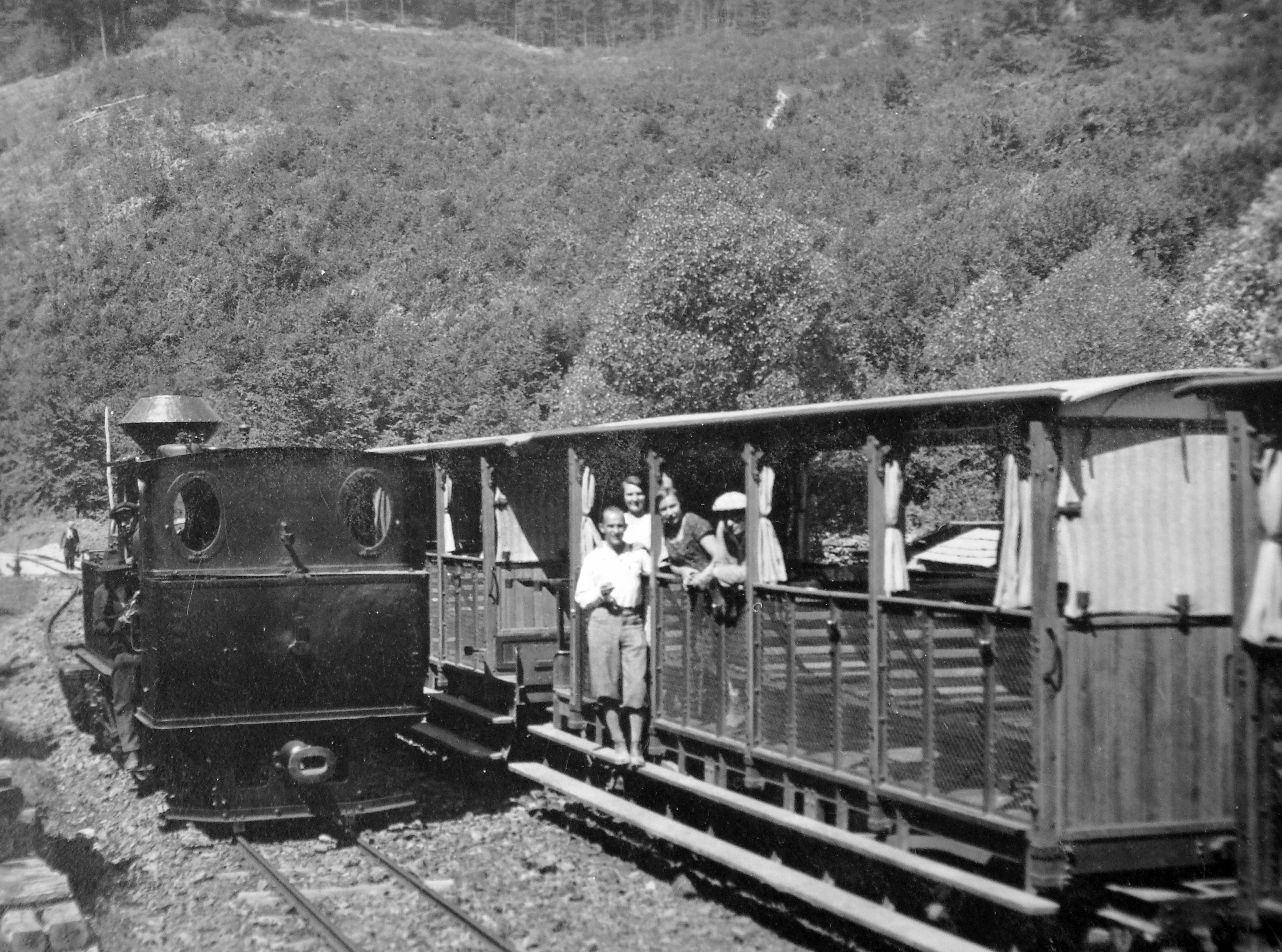 Gőzmozdony és Diamond személykocsik 1932-ben a Lillafüredi Állami Erdei Vasúton